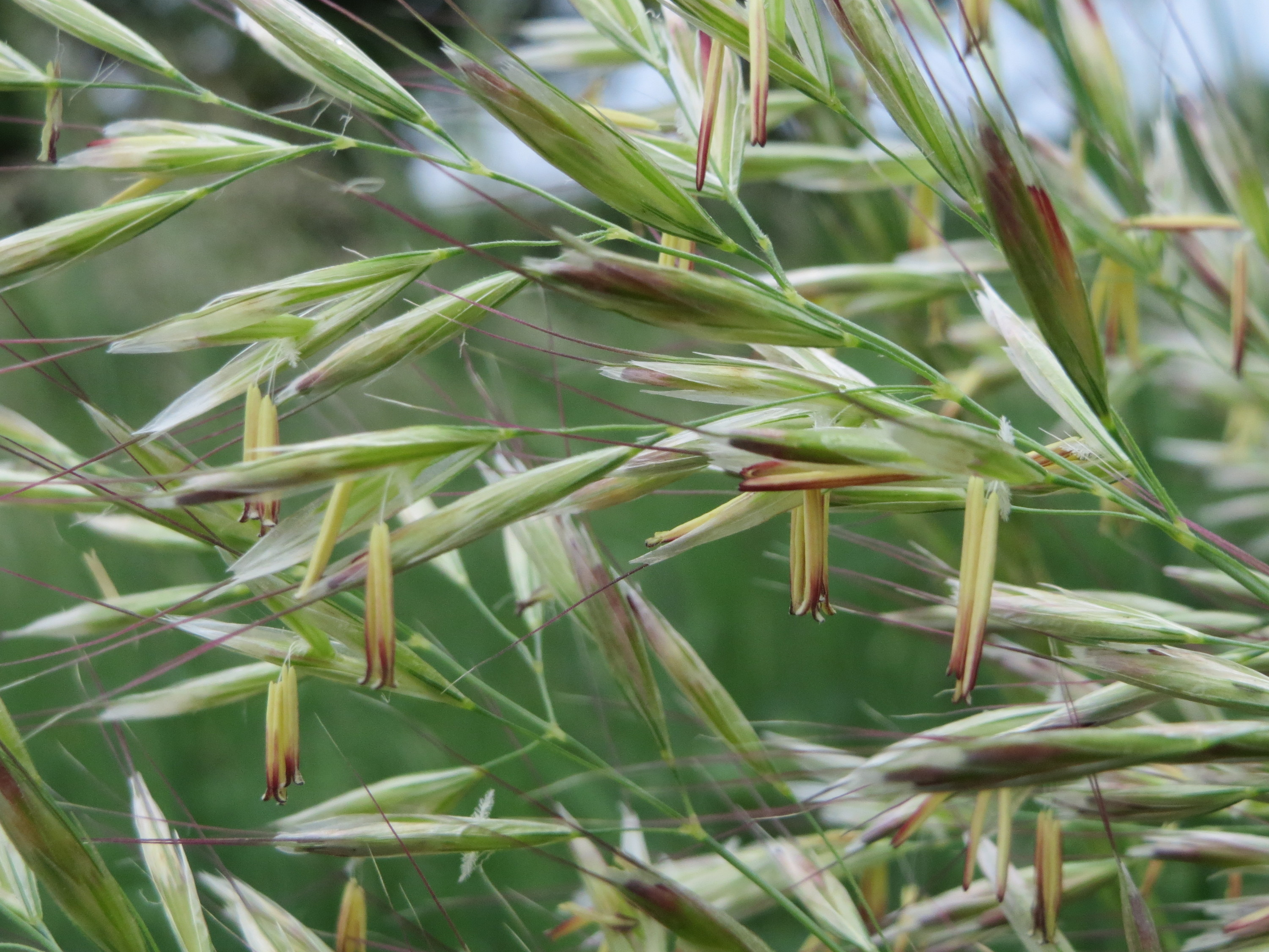 Flaumiger Wiesenhafer (Avenula pubescens) im Naturschutzgebiet „Oftersheimer Dünen“ (Teilgebiet „Am Golfplatz“)